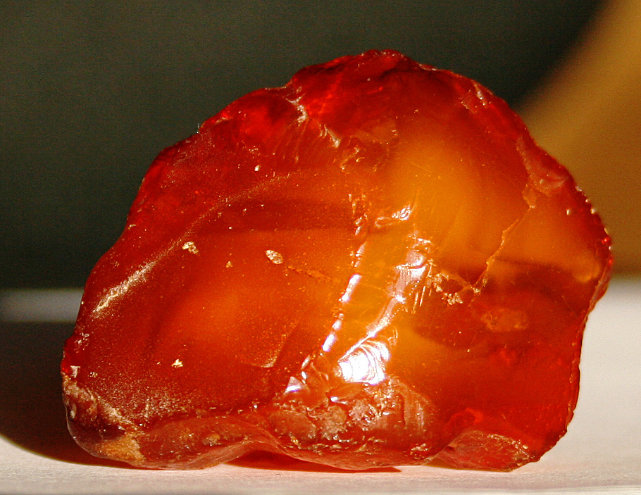 Беларуская (тарашкевіца): Беларускі бурштын, знойдзены каля Пінска падчас мэліярацыі